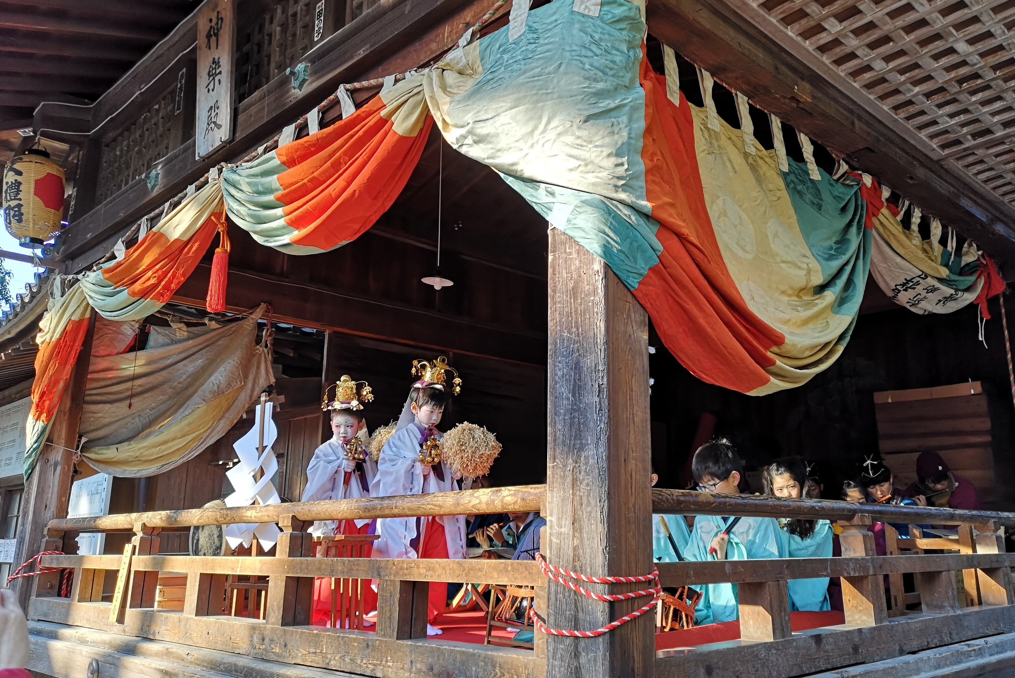 愛知県豊橋市の安久美神戸神明社の例祭「鬼祭」における「日の出神楽」